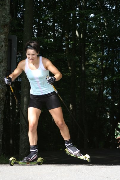 See Title